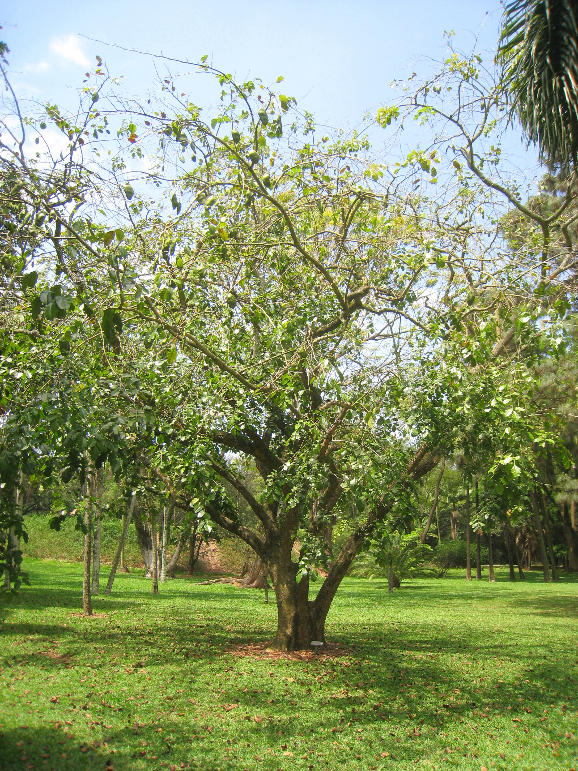 Swartzia langsdorffii in the Jardim Botânico de São Paulo, São Paulo City, SP, Brazil.